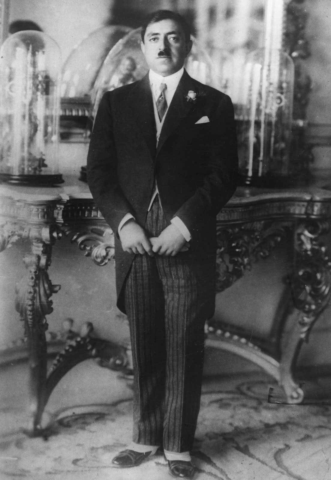 King Amanullah Khan of Afghanistan